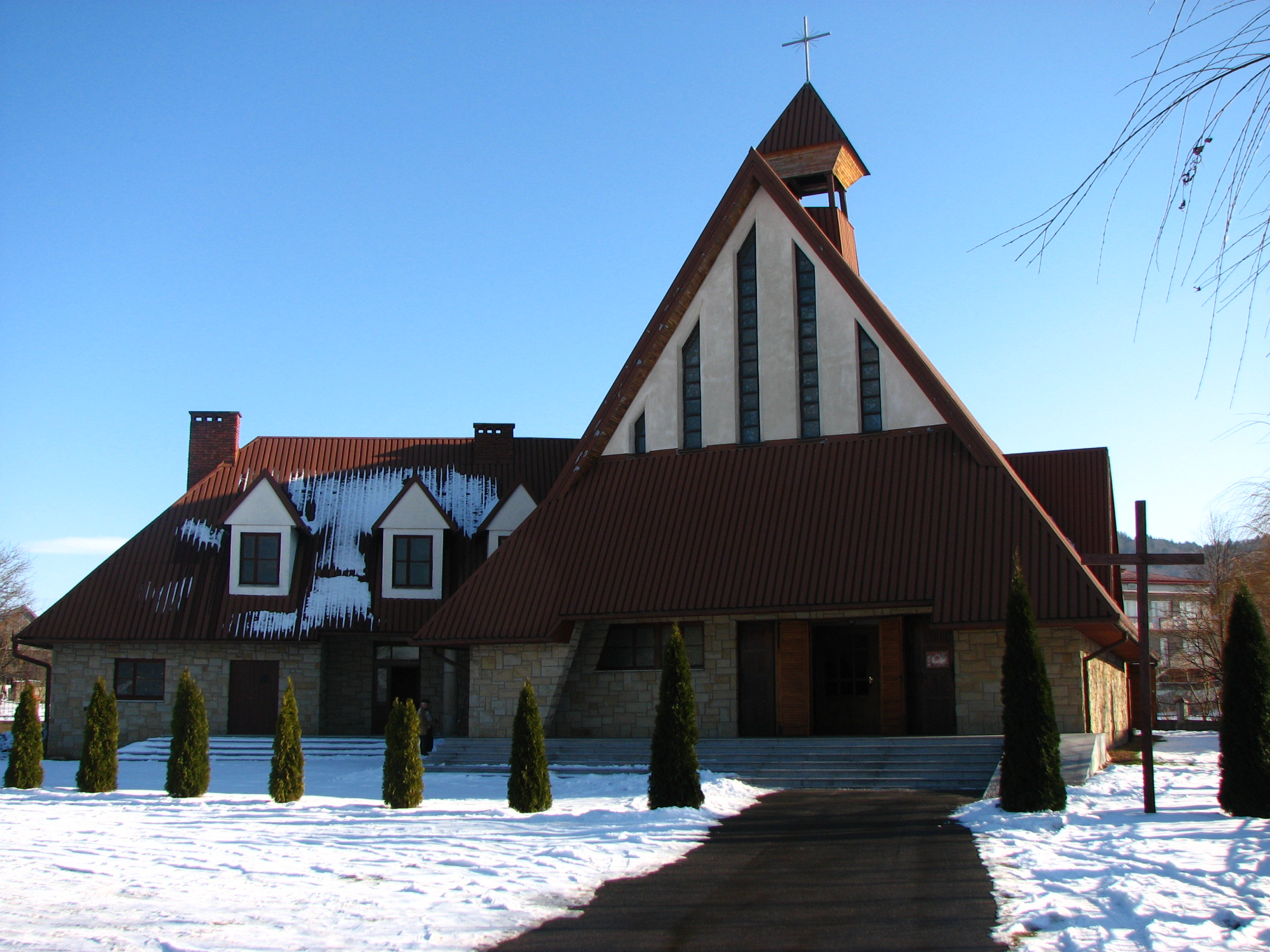 kaplica rzymskokatolicka pw. św. Cyryla i Metodego we wsi Roztoka-Brzeziny